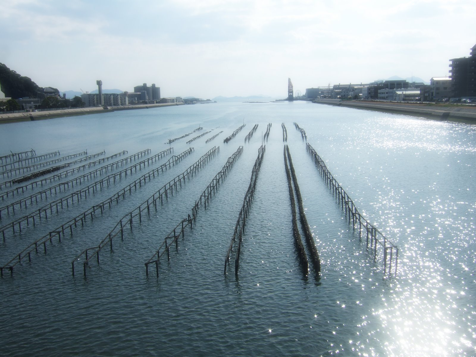 観音 Kannon Hiroshima City